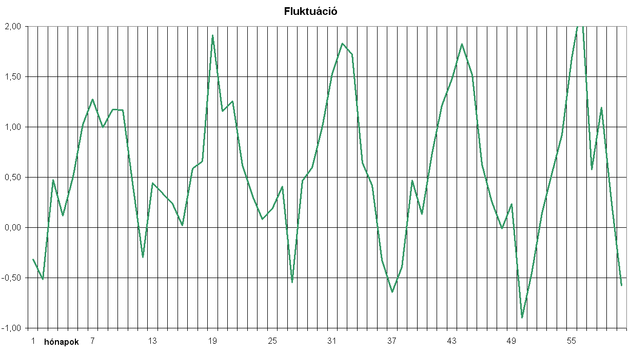 Time serie flucuation illustration